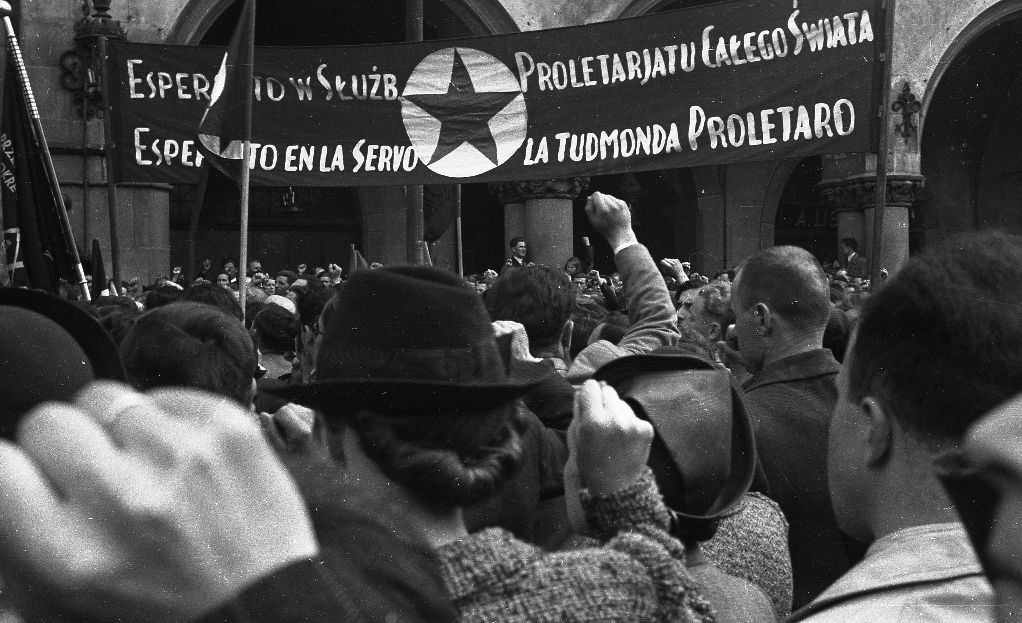 Wiec Polskiej Partii Socjalistycznej podczas obchodów Święta Pracy. Widok ogólny na tłum uczestników zgromadzony na Rynku Głównym pod Sukiennicami w Krakowie. Widoczny transparent z napisem Esperanto w służb. proletarjatu całego świata (Esperanto en la servo ... la tudmonda [tutmonda] proletaro)